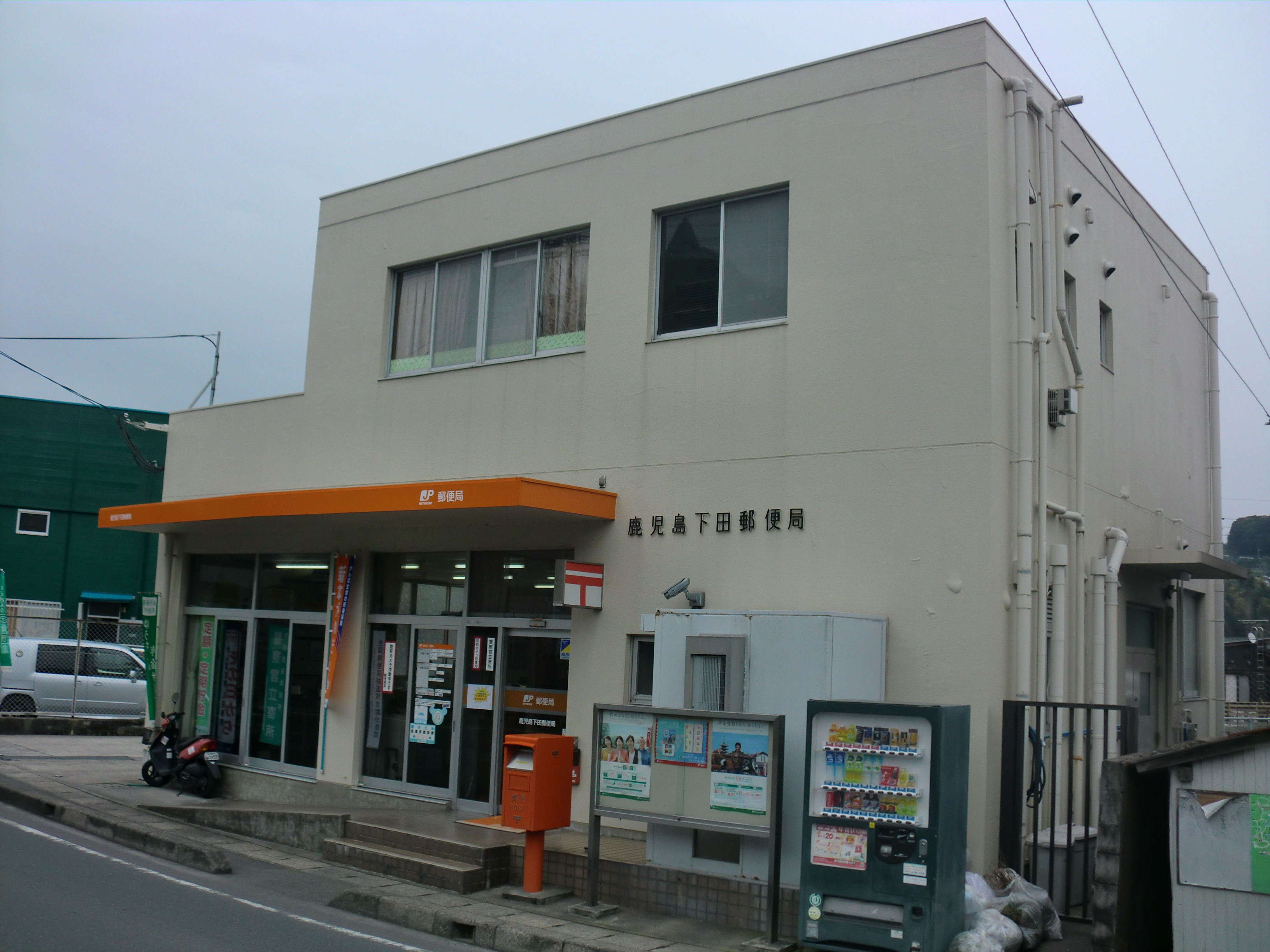 鹿児島市にある鹿児島下田（かごしましもだ）郵便局